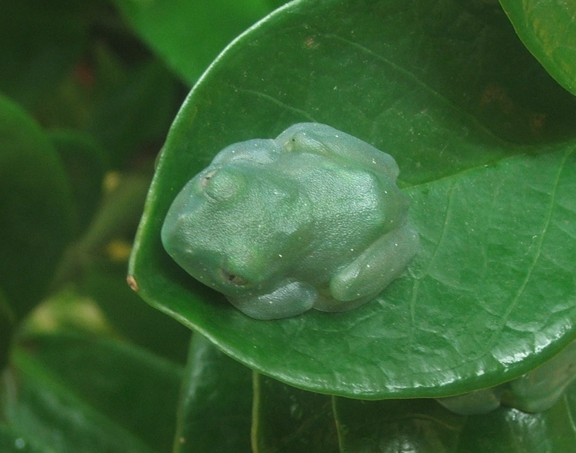 Abbildung von Leptopelis barbouri - Das Bild zeigt ein adultes, schlafendes, weibliches Exemplar von Leptopelis barbouri. Das Bild wurde in einem Terrarium aufgenommen.